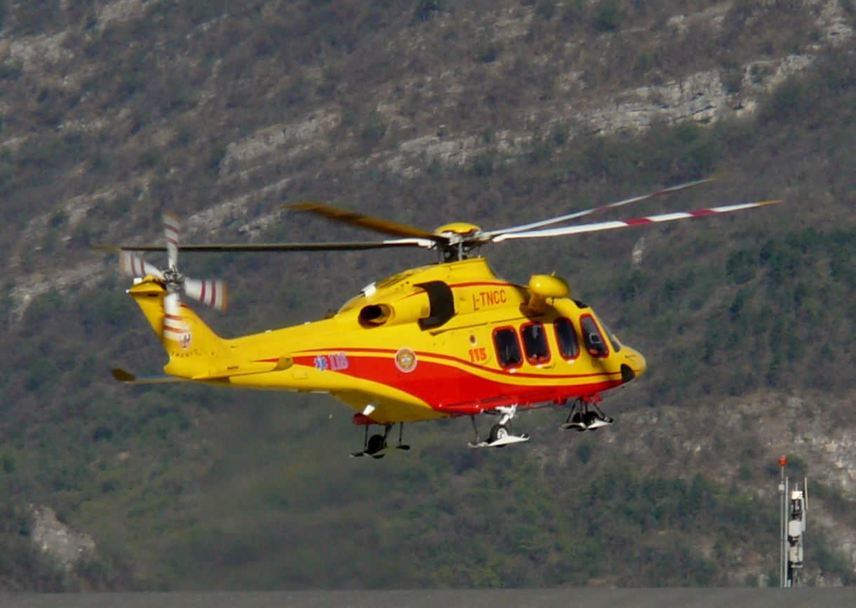 AgustaWestland AW139 a Trento